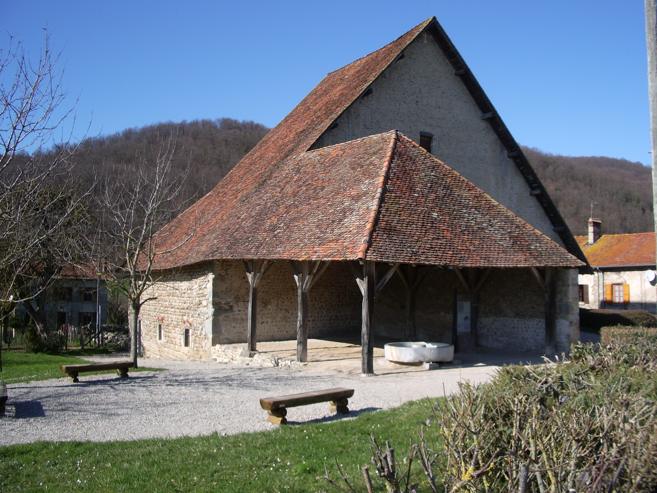 Grange Dimière (Le Pin - France)